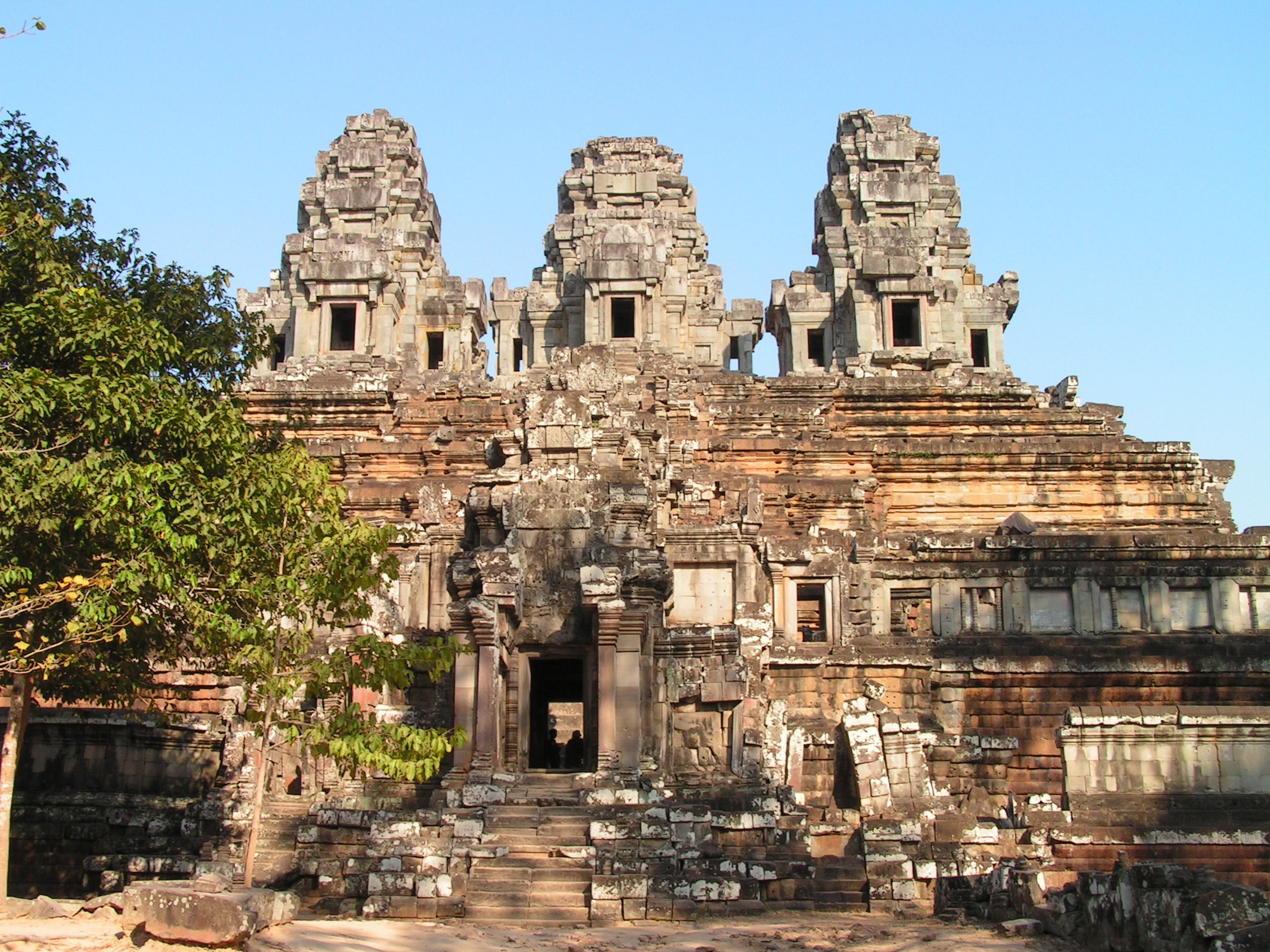 Temple-mountain Ta Keo at Angkor